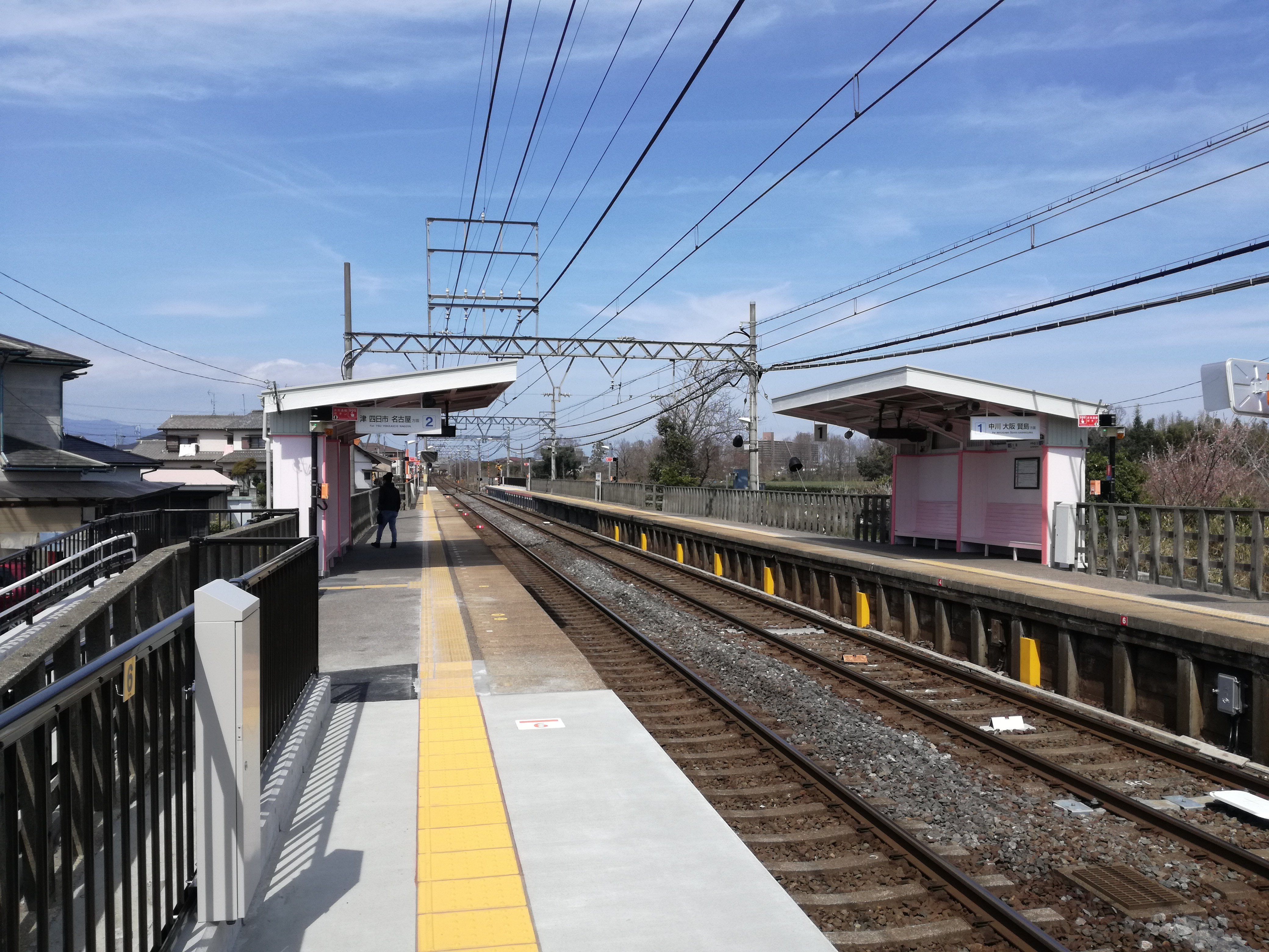 ホームの延長された桃園駅